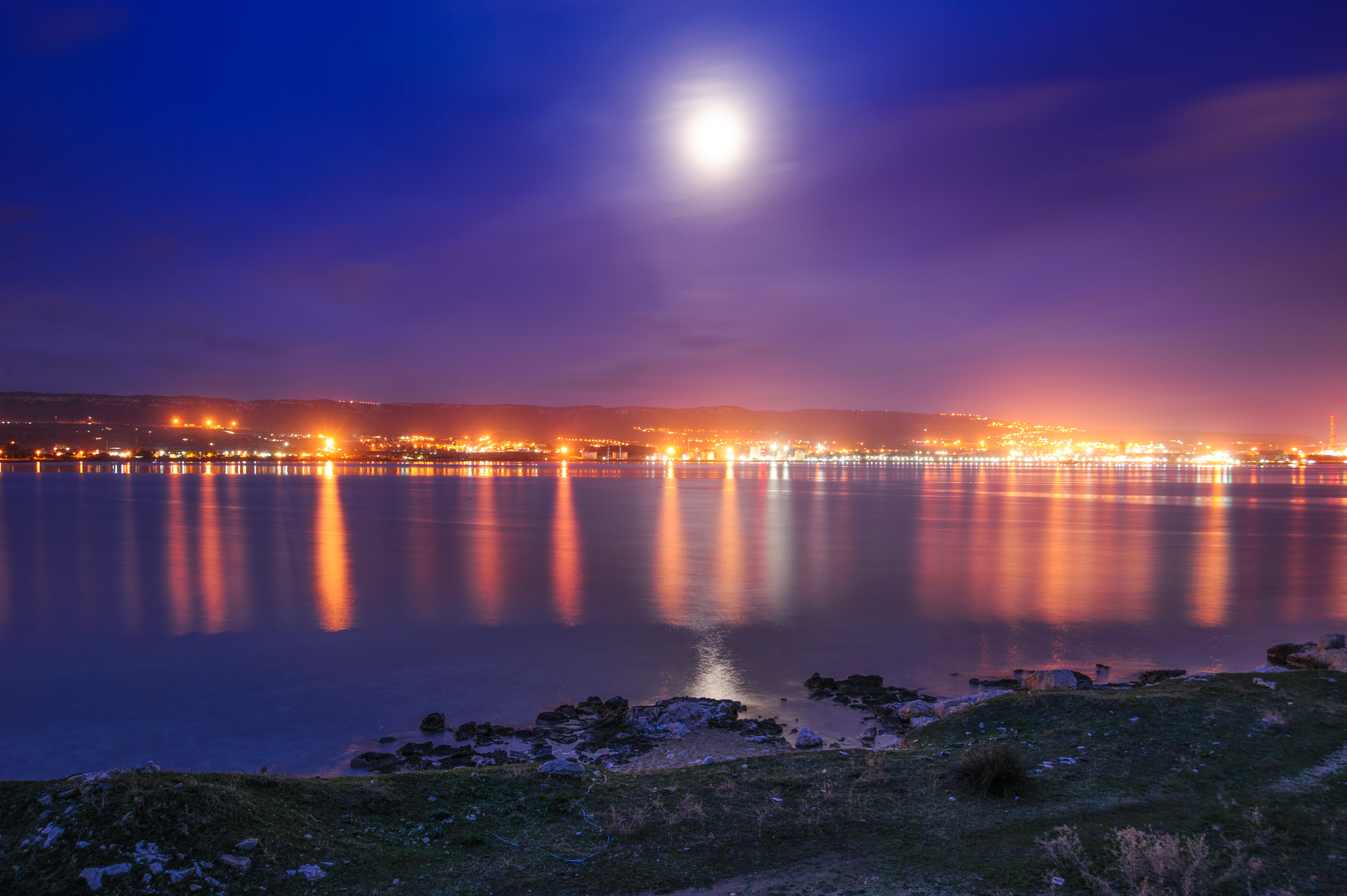 Penisola di Thapsos (odierna Penisola di Magnisi), Priolo Gargallo, SR e Golfo di Augusta e Monti Iblei sullo sfondo.